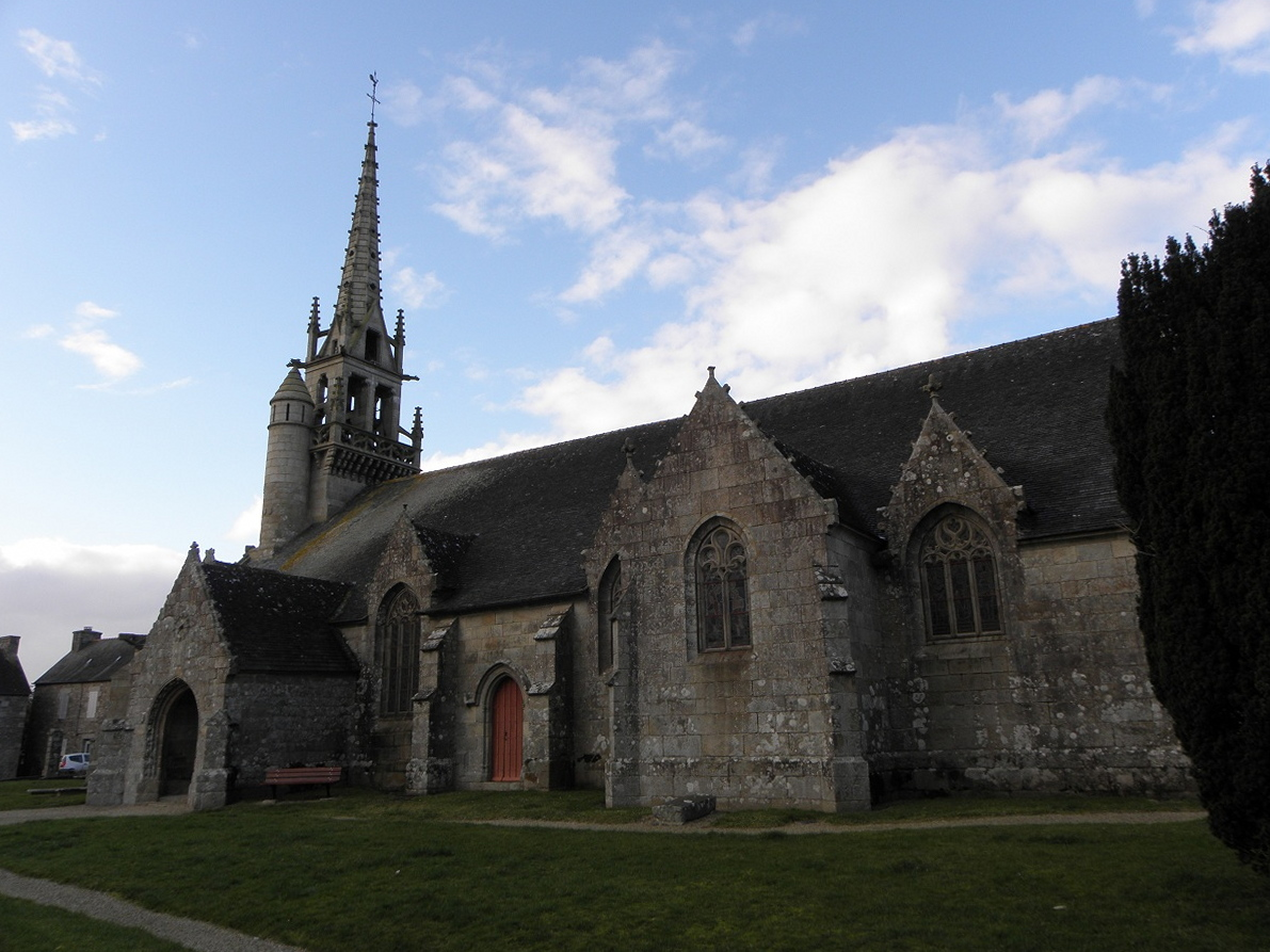 Flanc méridional de l'église Saint-Pierre de Plounévez-Moëdec (22).